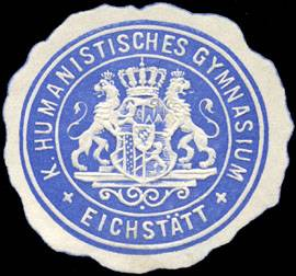 Sealing stamp Title: Königliches Humanistisches Gymnasium - Eichstätt Description: blau, weiß, geprägt Place: Eichstätt size: 4 cm